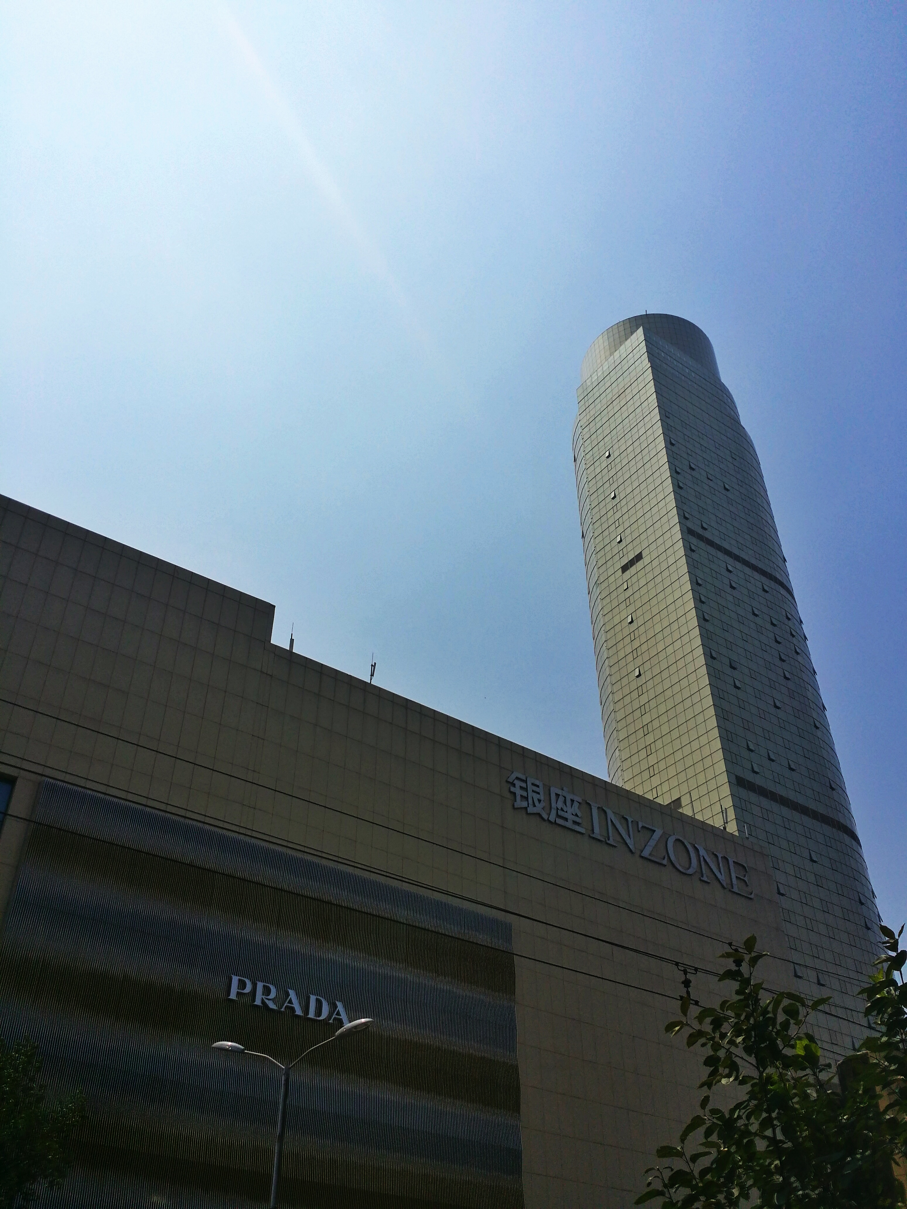 济南银座索菲特